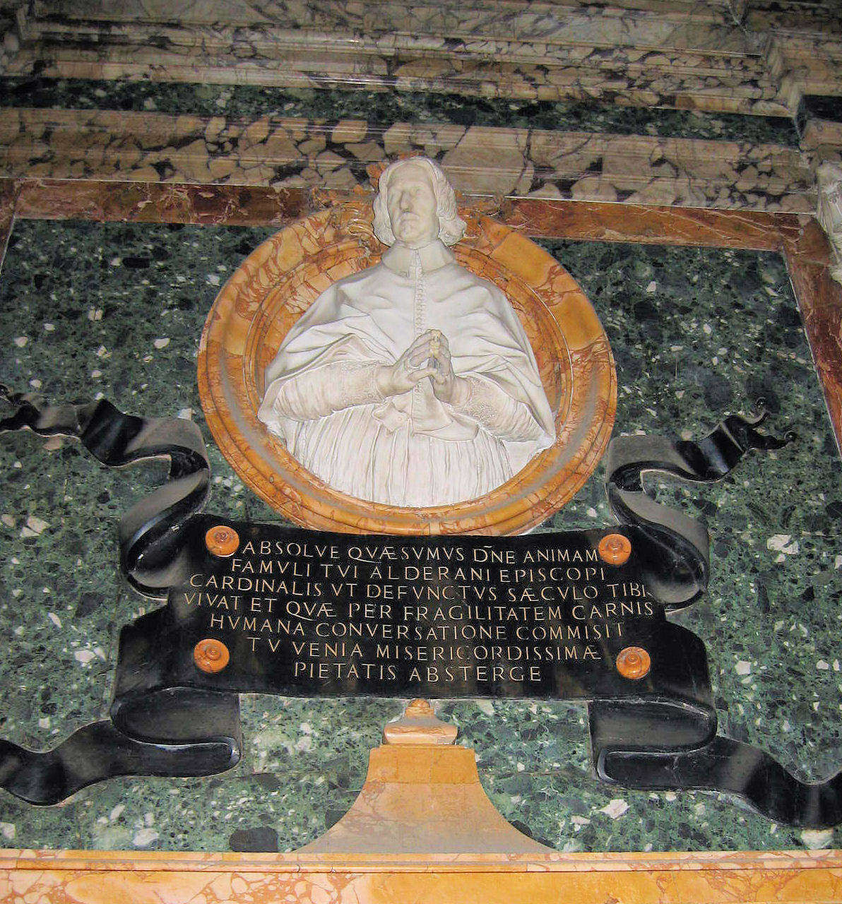 Tomb of Cardinal Alderano Cybo Malaspina 1613 1700), Santa Maria del Popolo, RomaSculpture by Francesco Cavallini (1684)